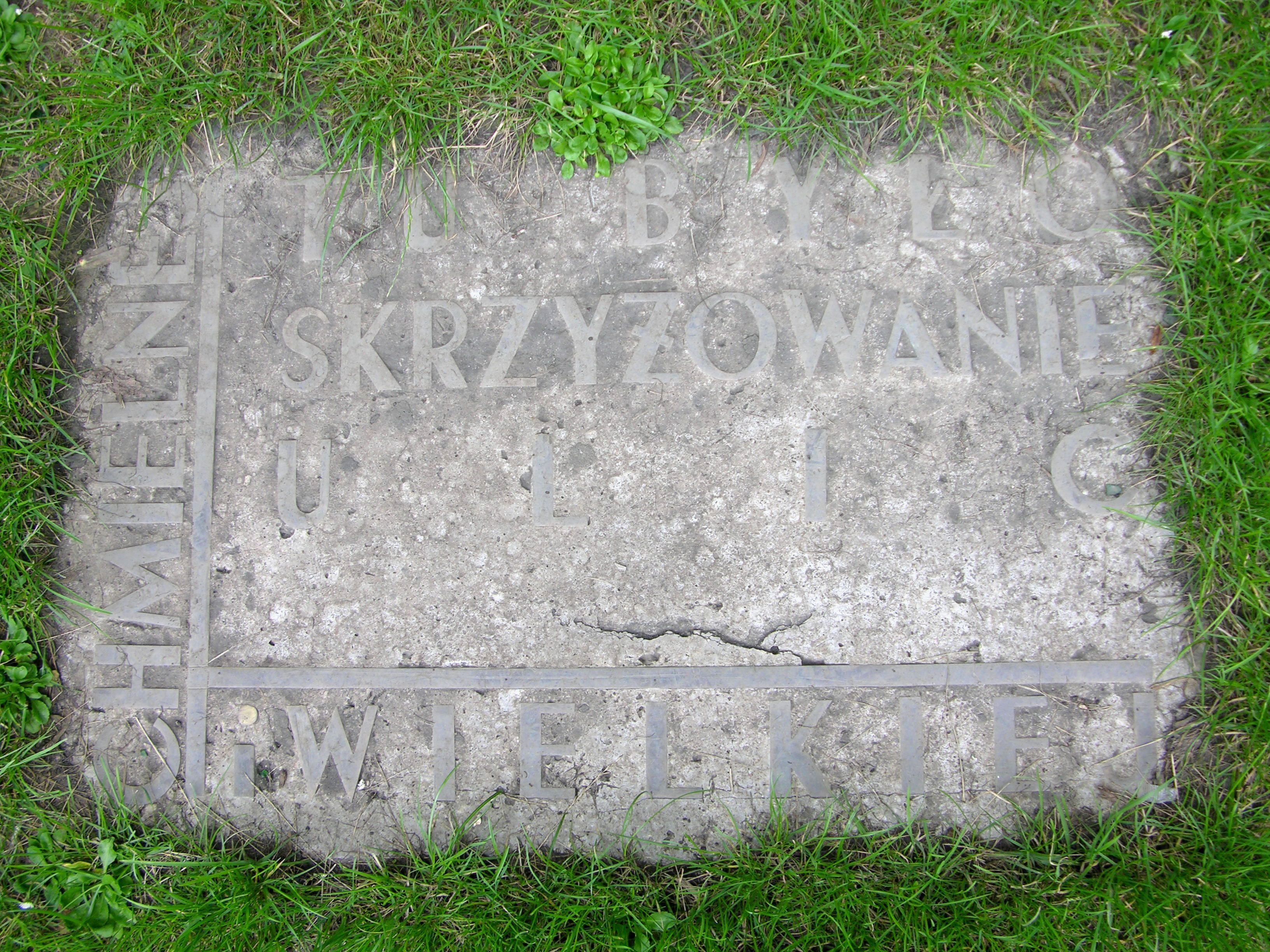 Upamiętnienie nieistniejącego skrzyżowania ulic Chmielnej i Wielkiej na placu Defilad, na trawniku w pobliżu Teatru Dramatycznego